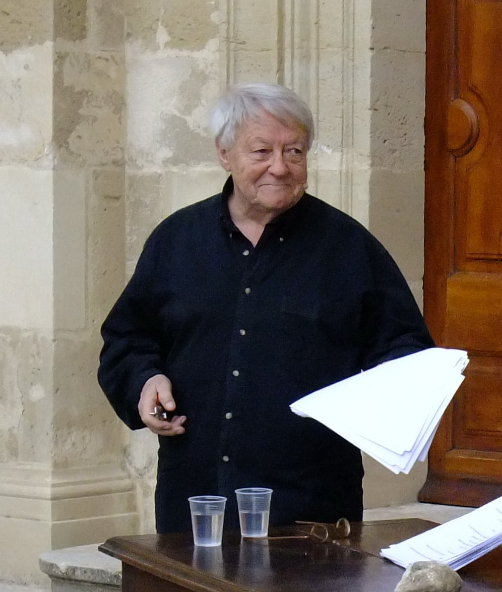 Roger Dumas au 15° festival de la correspondance de Grignan (Drôme France) en 2010.